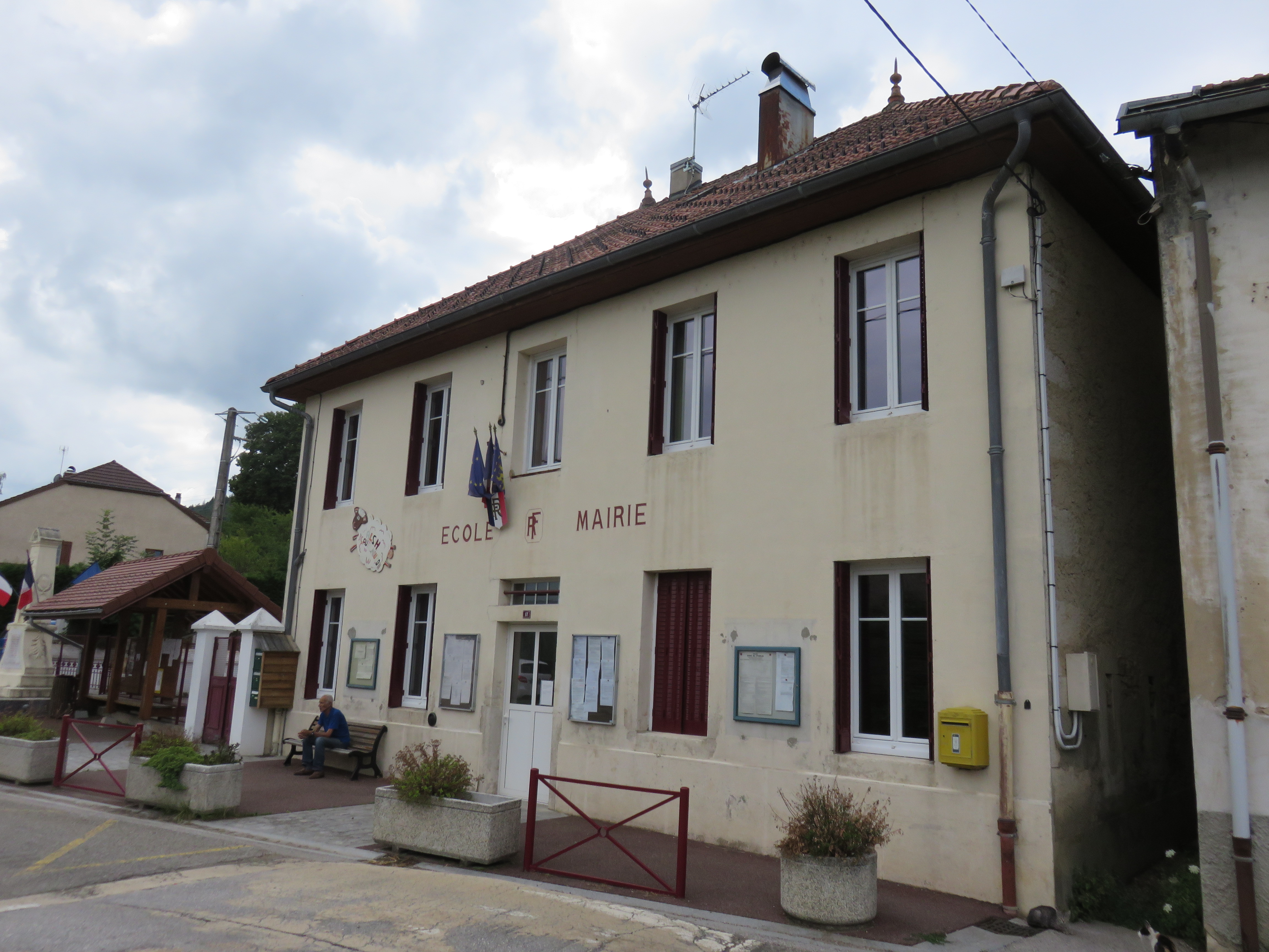 École-mairie de Villard-sur-Bienne (Jura, France).